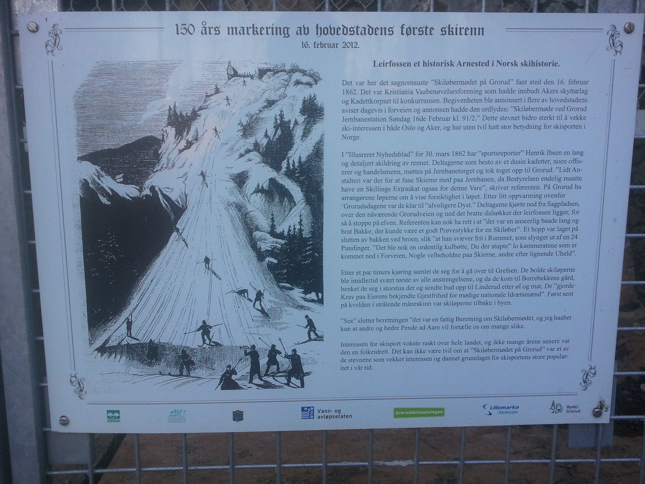 Kommunens oppslag ved Leirfossen.